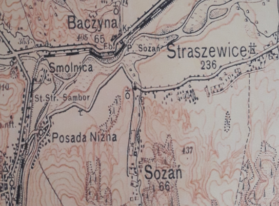 Carte militaire du district de Sambor (1877), au temps de l'Autriche-Hongrie.